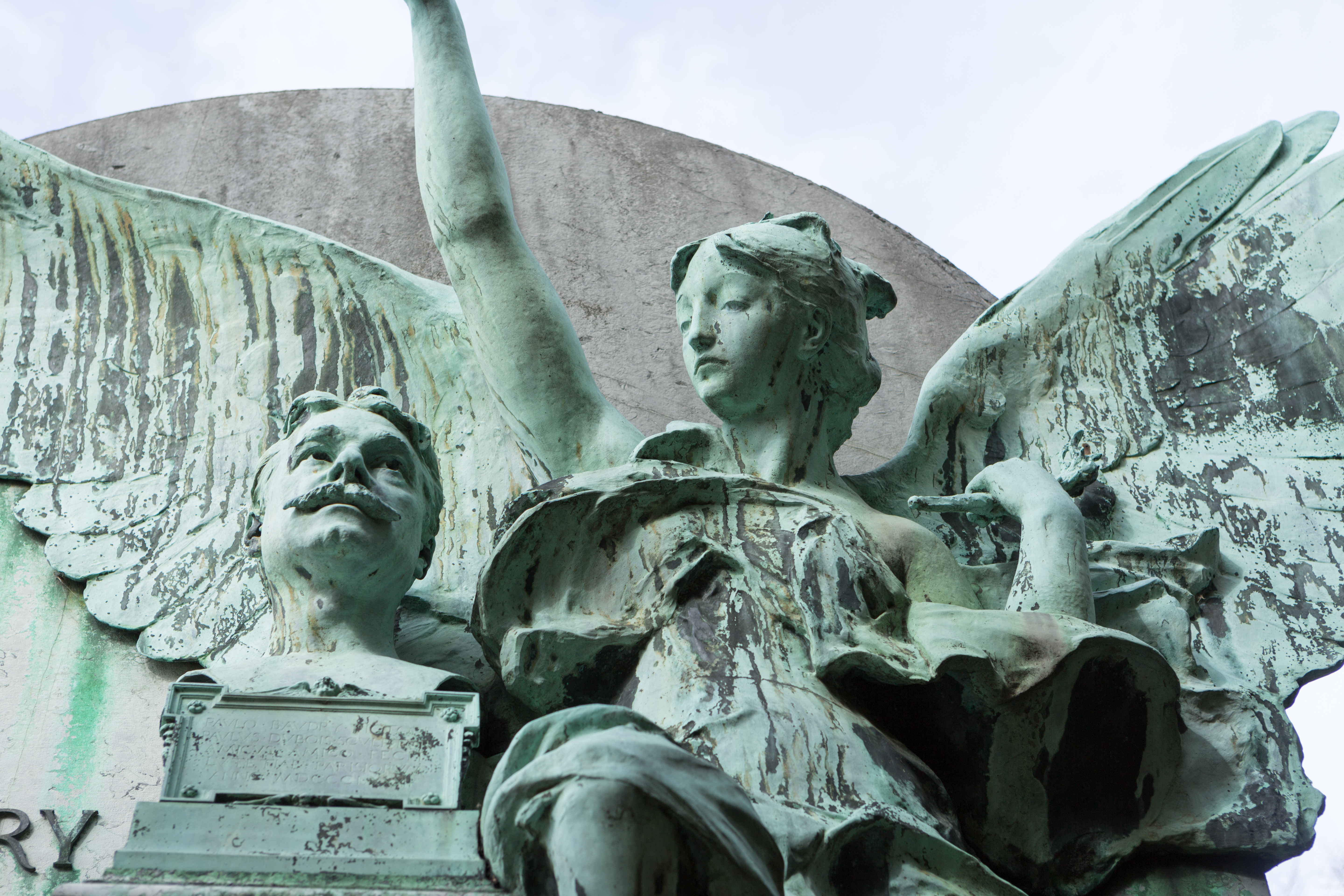 Sépulture de Paul Baudry (1828-1886). Il est l'un des plus célèbres représentants de la peinture académique sous le Second Empire. Monument funéraire dessiné par Ambroise Baudry, le frère de Paul Baudry. Il se compose d'un sarcophage surmonté d'une pyramide, en marbre noir, adossés à une large stèle en marbre gris. Un buste de Baudry par Paul Dubois est posé sur la pyramide. Le monument est complété de deux œuvres en bronze d'Antonin Mercié. A gauche, la Douleur représentée par une femme recouverte de longs voiles, appuyée sur le sarcophage et fixant du regard une palette, des pinceaux et une palme. A droite, plane dans les airs une Renommée qui dépose une couronne de laurier sur la tête de Paul Baudry. La statue de la femme voilée est signée E. Bardedienne, fondeur, Paris.